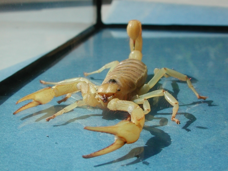 Skorpion aus Gefangenschaft, Hadrurus arizonensis, Haariger Wüstenskorpion, Desert Hairy Scorpion